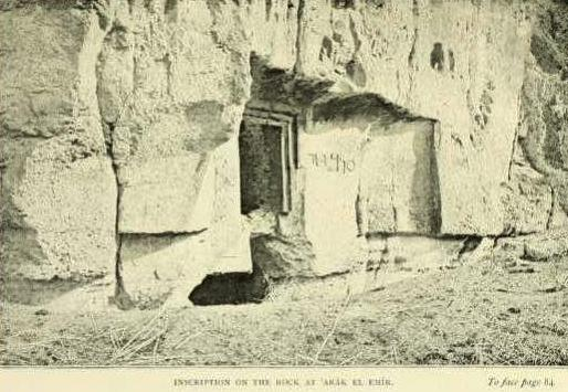 תמונות ושרטוטים מהאתר עראק אל אמיר שצילם או שרטט קלוד קונדר בסקר ארץ ישראל המזרחית בשנת 1881. צילום מערה 13 עם כתובת